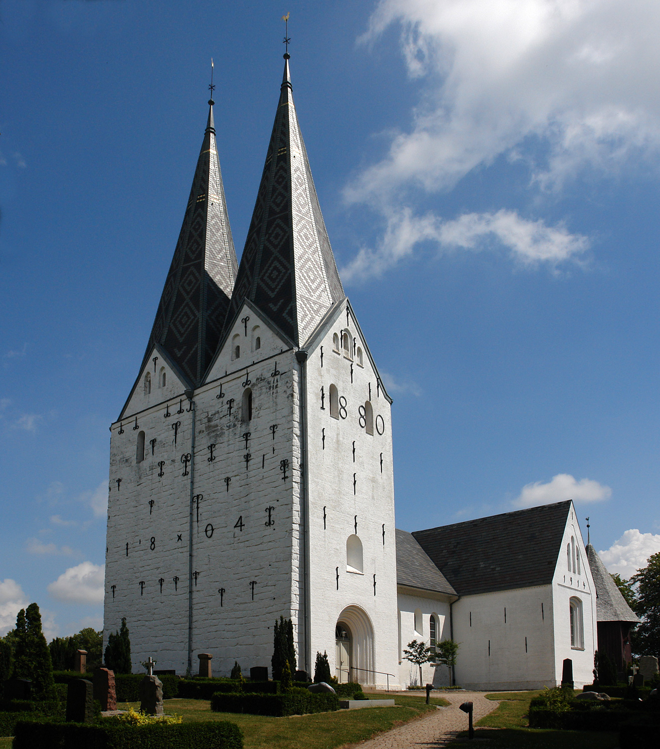 Broager Kirke: um 1200 auf einem 40 m hohen Hügel in romanischem Stil aus Ziegeln erbaut. Der 40 m hohe Turm mit zwei Spitzen ist etwas jünger, Westmauer 1804 mit Quadern verstärkt